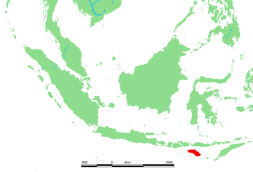 ID Tidore.PNG